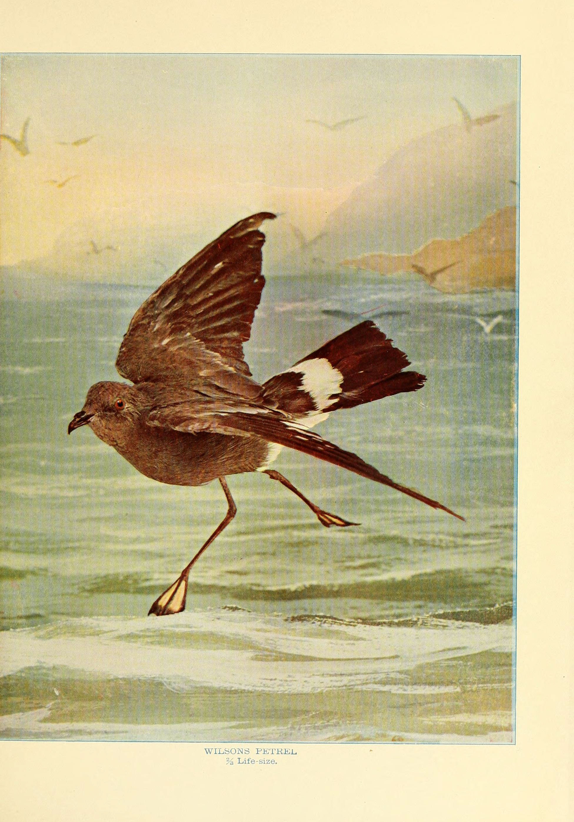 !*««'«»»■» 73 Life-size.